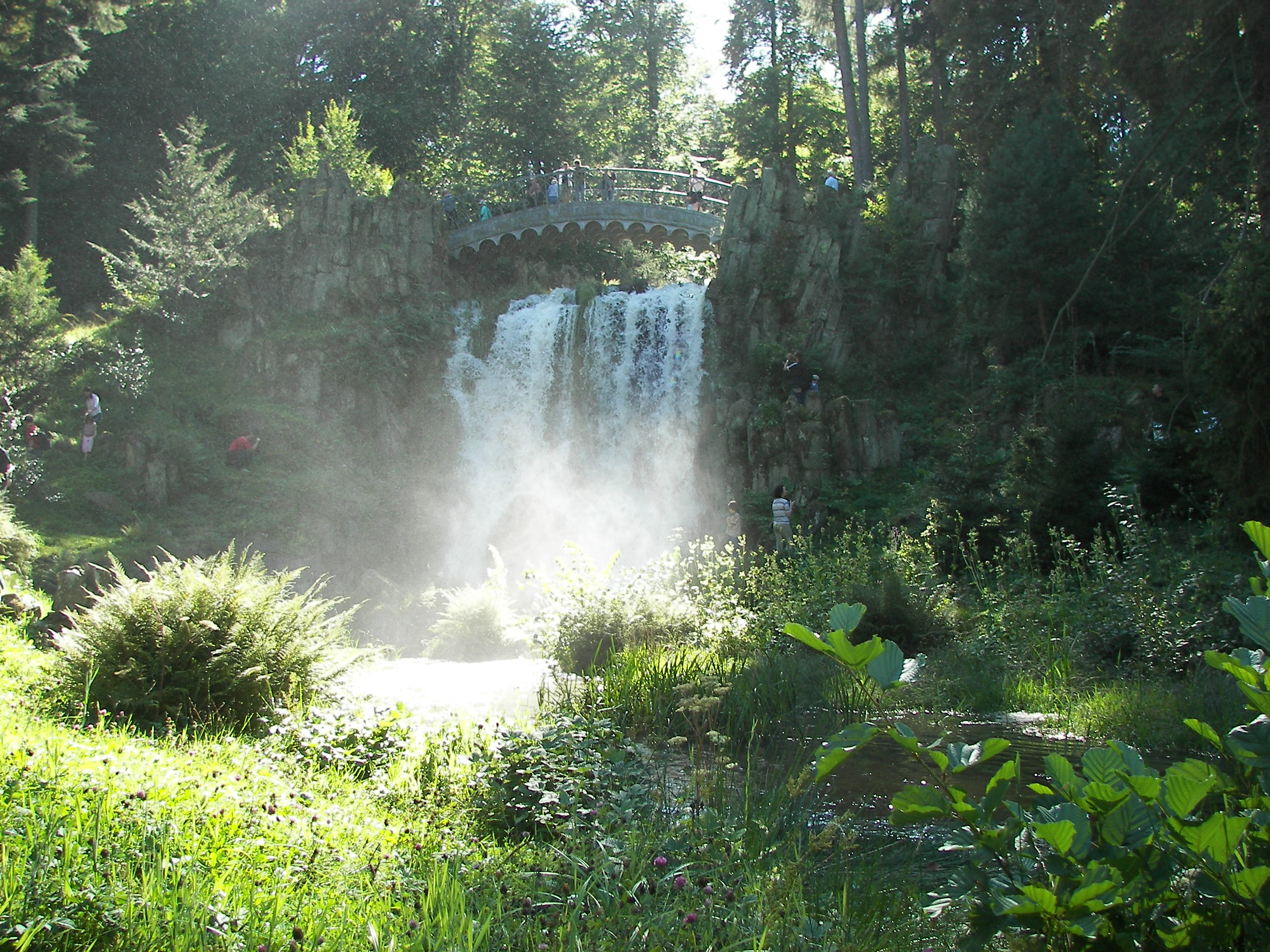 Kassel, Schlosspark Wilhelmshöhe, Teufelsbrücke